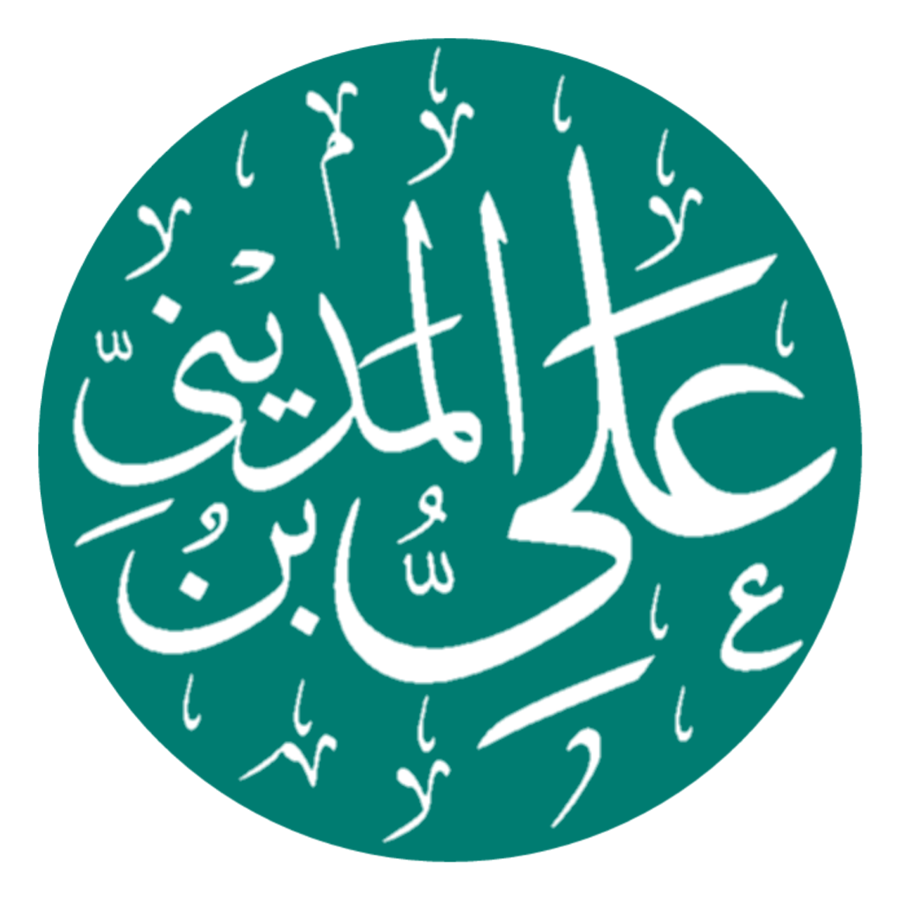 Ali ibn al-Madini name